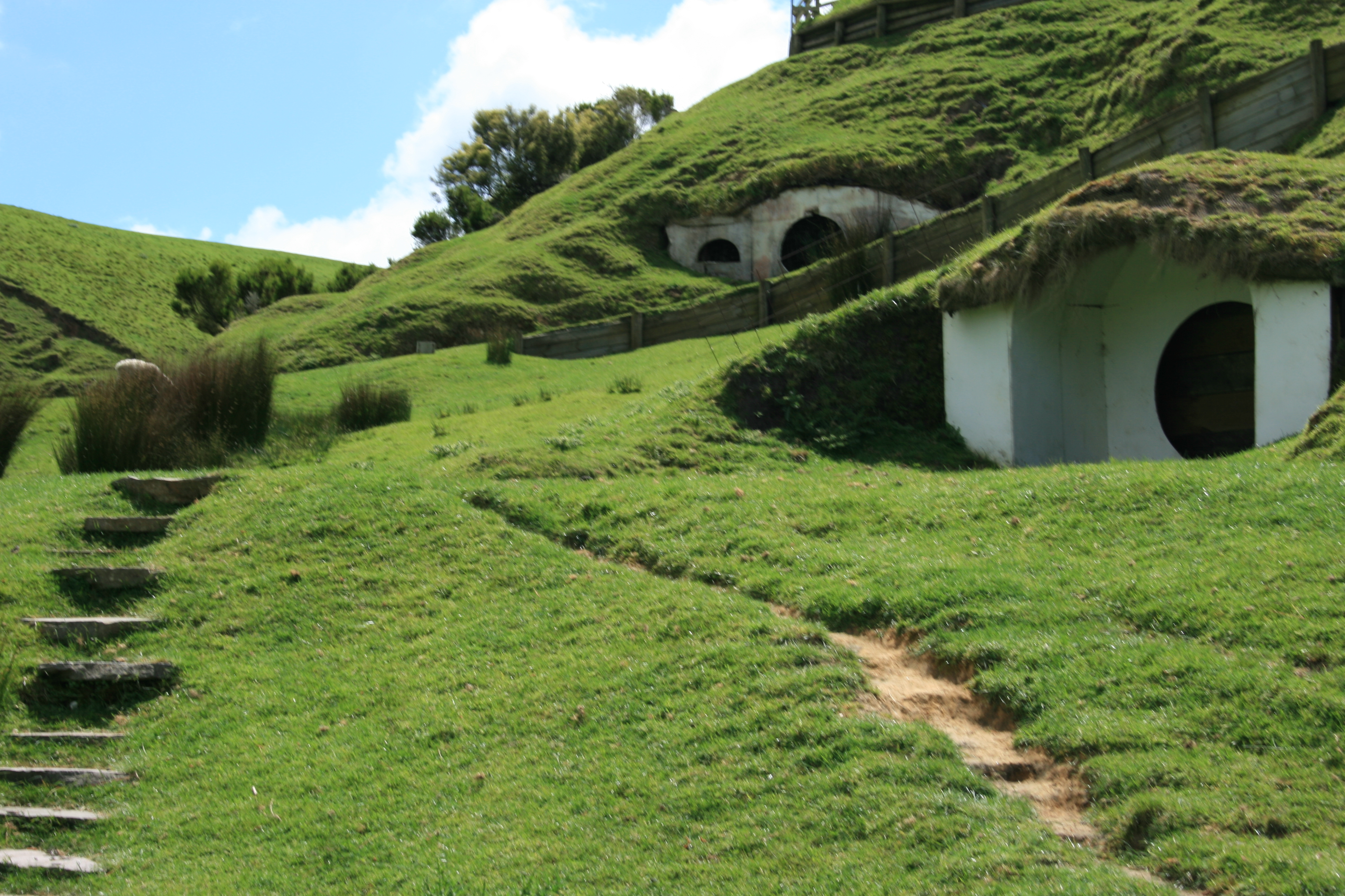 Matamata, en Nueva Zelanda, donde se crearon las locaciones para Hobbiton en El Señor de los Anillos.